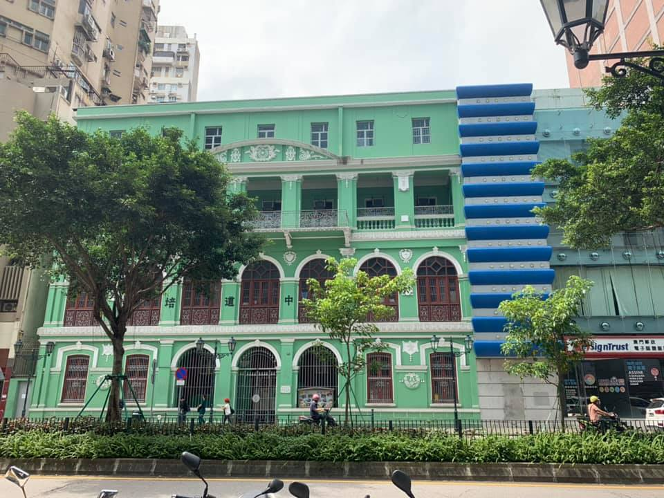 培道中學南灣分校校區